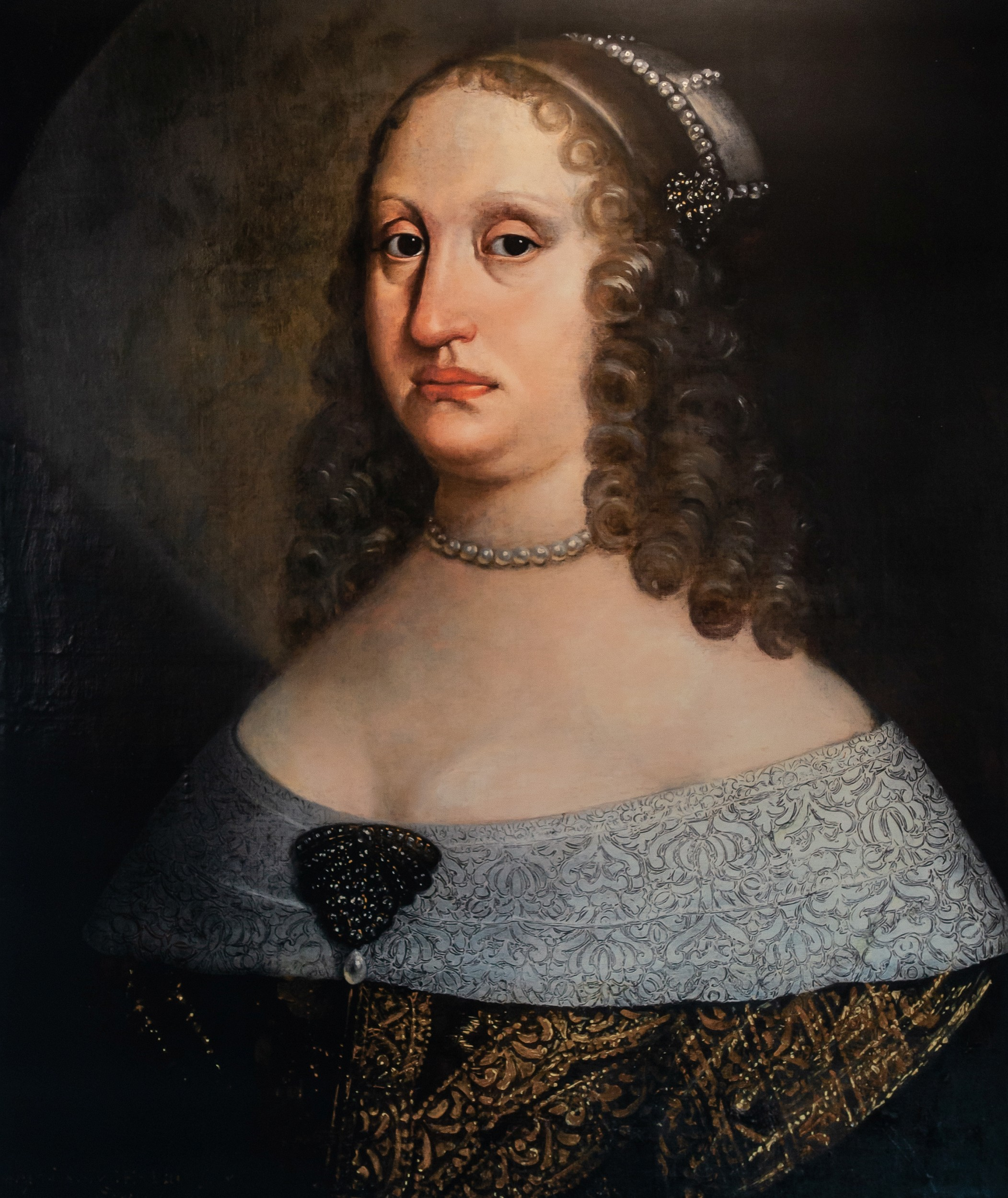 Gräfin Ernestine zu Isenburg-Büdingen-Birstein (geb. 9.2.1614 in Offenbach, gest. 5.12.1665 in Detmold), Gemahlin von Graf Hermann Adolf zu Lippe-Detmold. Originalgemälde von Simon Peter Tilmann (Simon Peter Tilemann?) aus dem Jahr 1652 im Schloss Detmold, hier Replikat im Burgmuseum Horn.